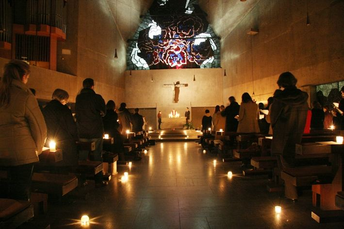 Hochschulgottesdienst im Advent 2006 der KHG in St. Ignatius